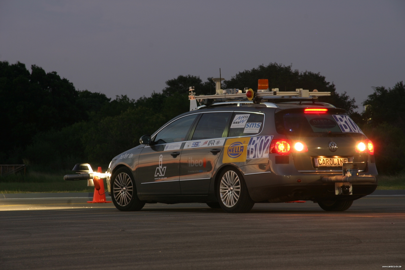 CarOLO Team - DARPA Site Visit 2007